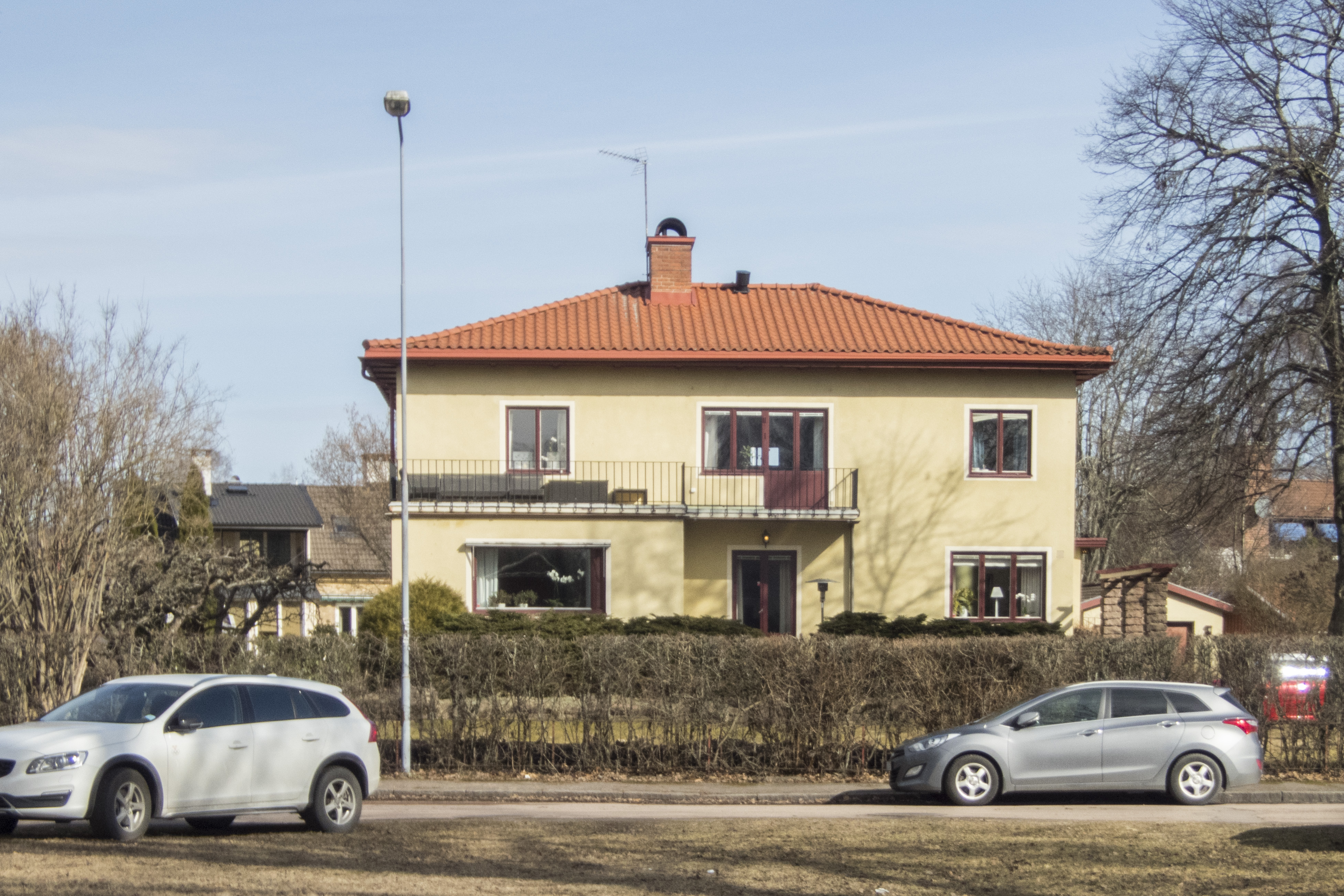 Minerva 8, Bjurbäcksgatan 10 Karlstad. Nybyggnadsår 1942-63. Arkitekt Gunnar Henriksson